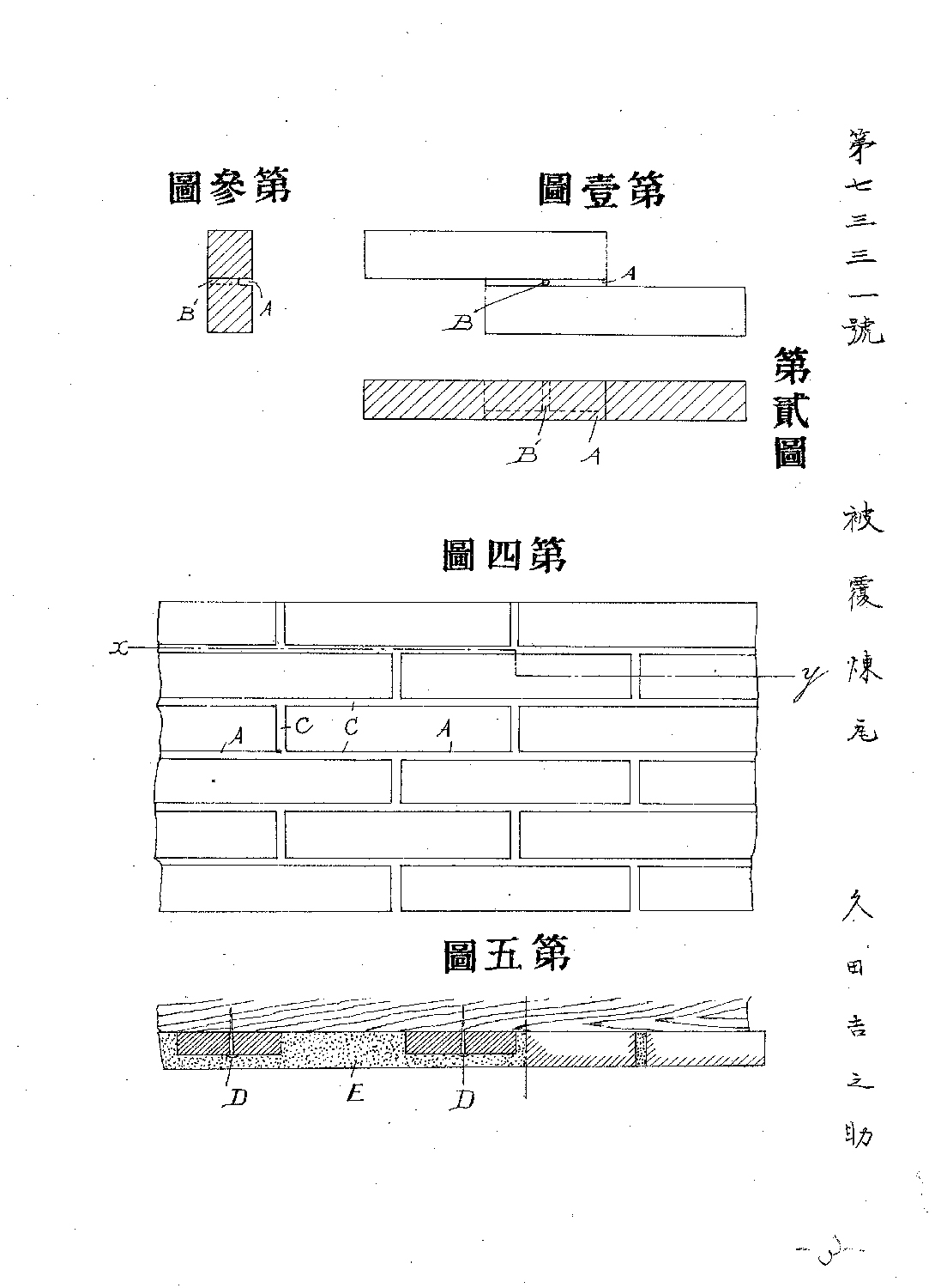 日本における最初のタイル特許